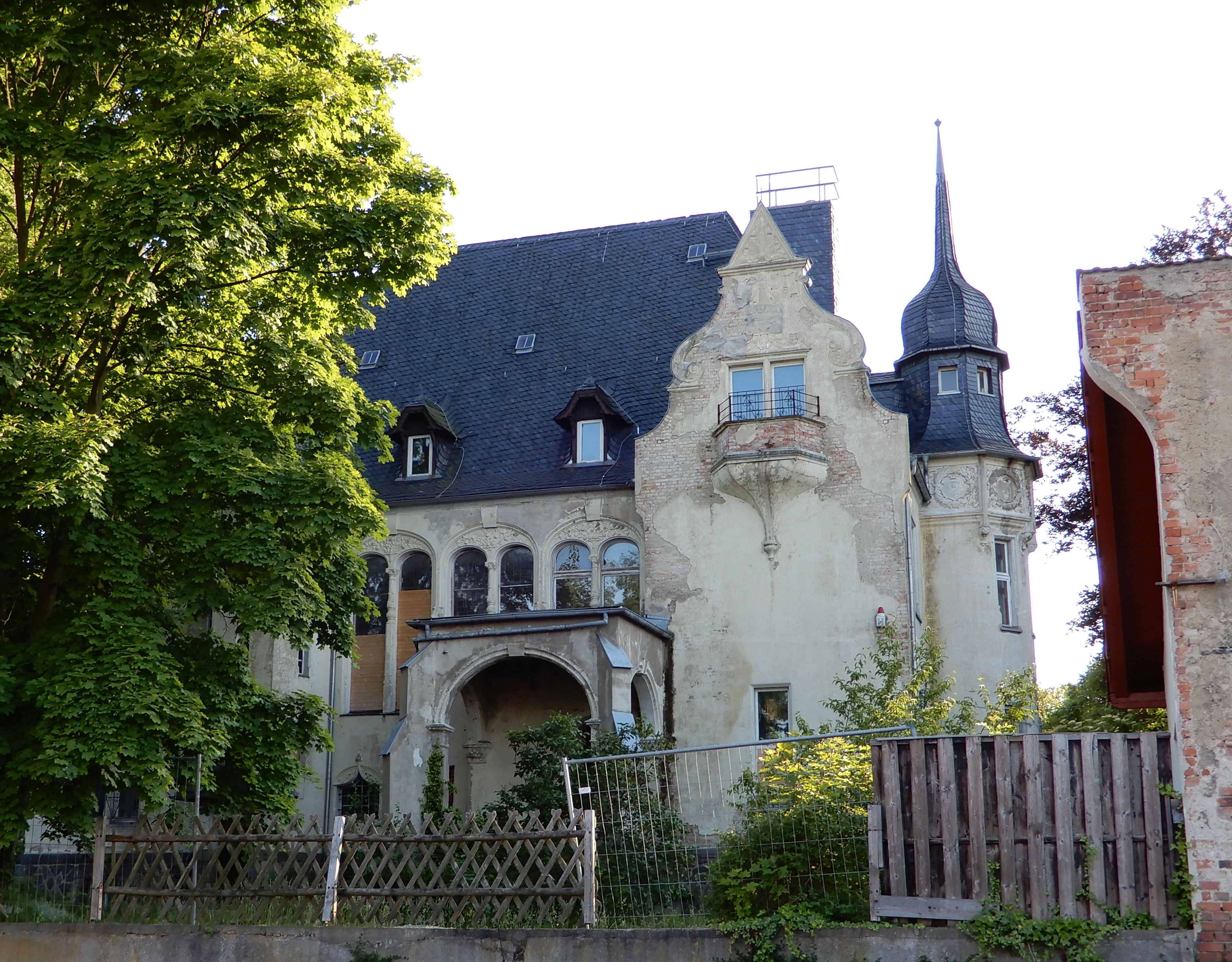 Villa Weise. Erbaut 1899–1900 nach Plänen des Berliner Architekten Hans Grisebach.